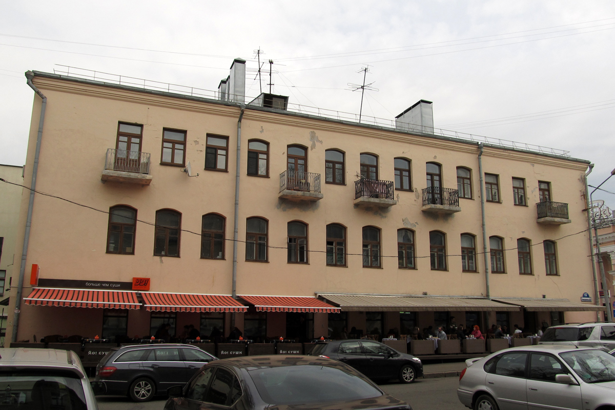 Мінск. Вуліца Інтэрнацыянальная, 9 / вуліца Камсамольская, 17